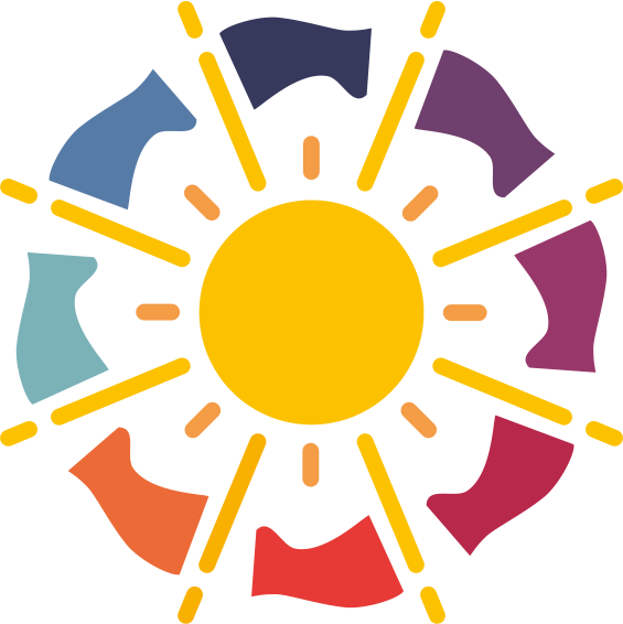 Logo de l'Année Internationale de la Lumière